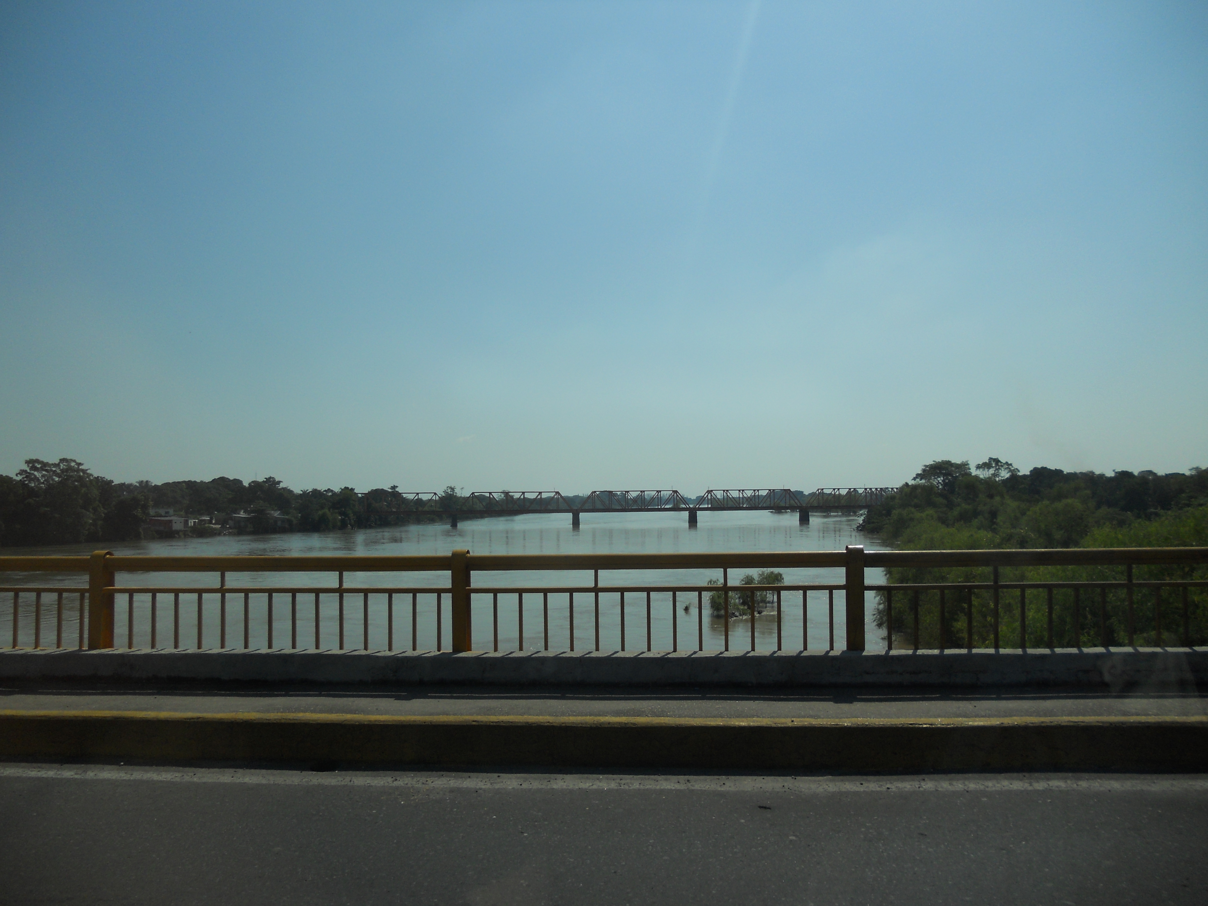 Toma del río Papaloapan visto desde el puente homónimo, entre la población de Santa Cruz, Cosamaloapan, Veracruz y la población de Papaloapan, Tuxtepec, Oaxaca. El río sirve de límite político entre ambos estados de México.